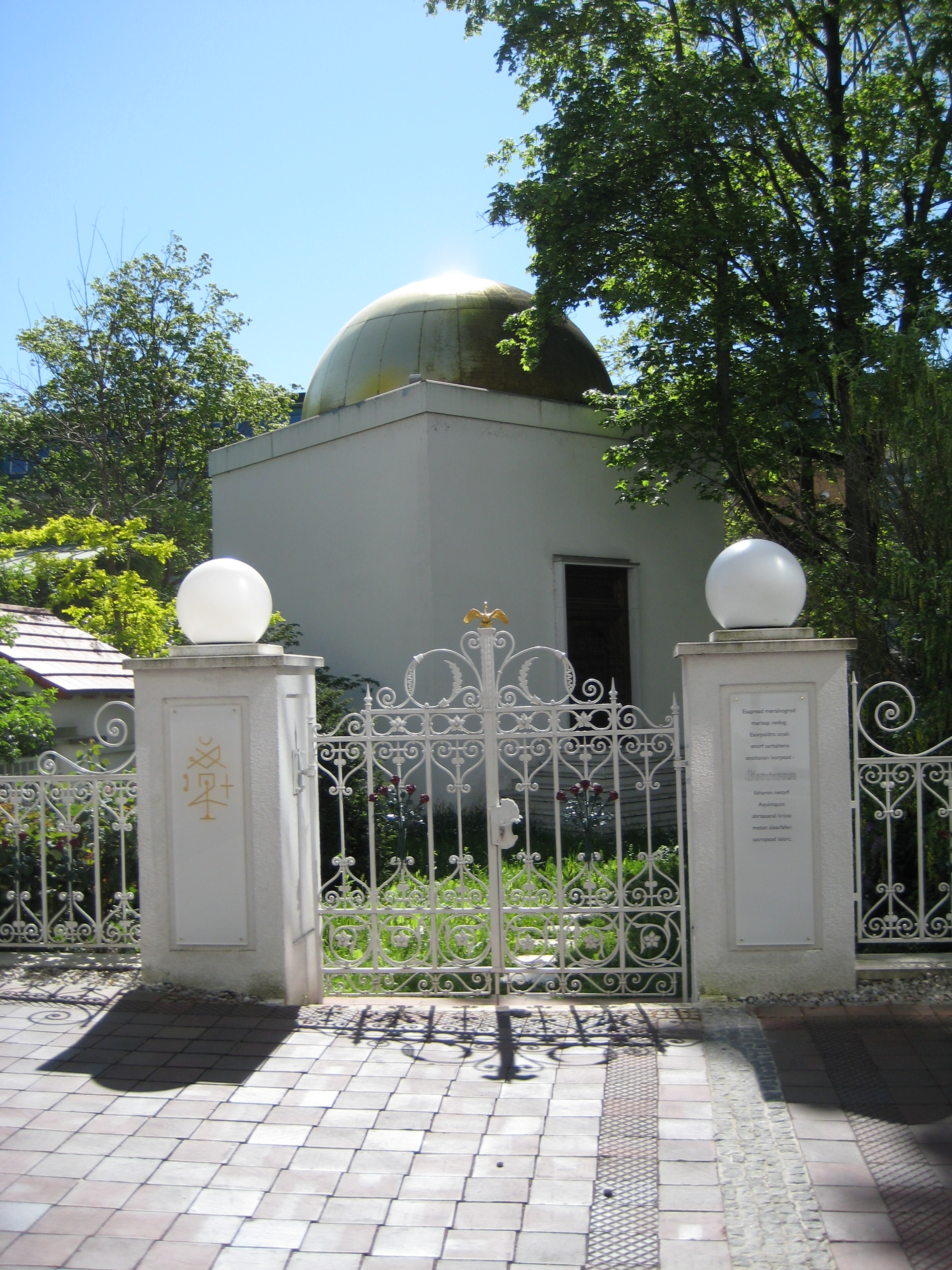 Kawwana – Kirche des Neuen Aeon - Tempel der Sekte in der Münchner Klenzestrasse